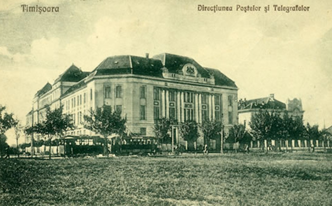 Postcard, Timisoara, Directiunea Postelor si Telegrafelor, 1926